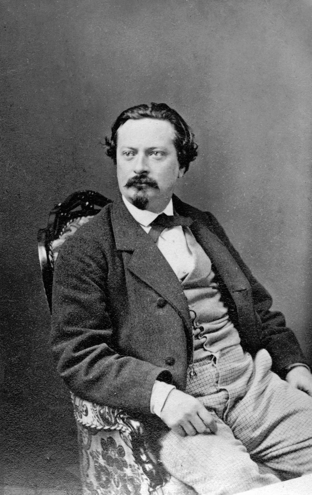 Bernhard Lundbergh, sångare vid Kungliga Operan 1863